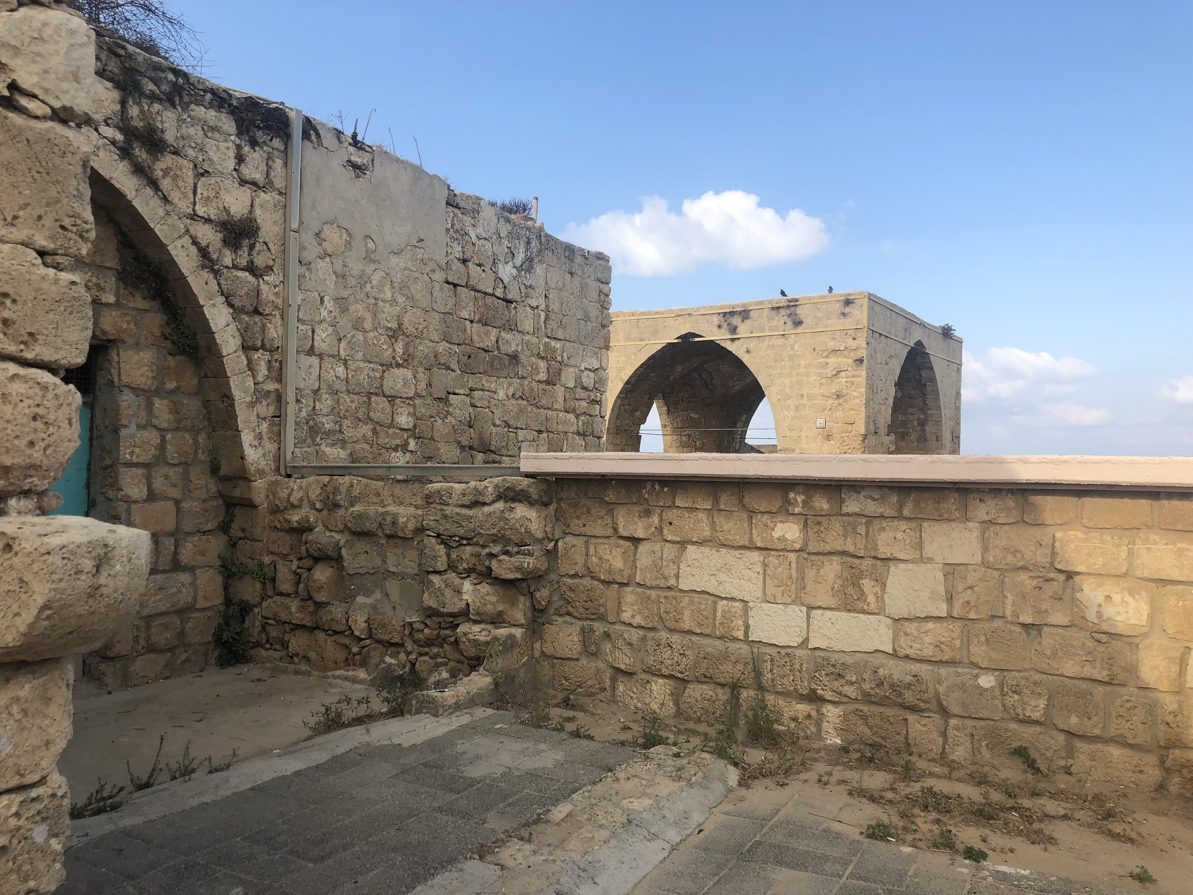 قرية الزيب، آثار قديمة